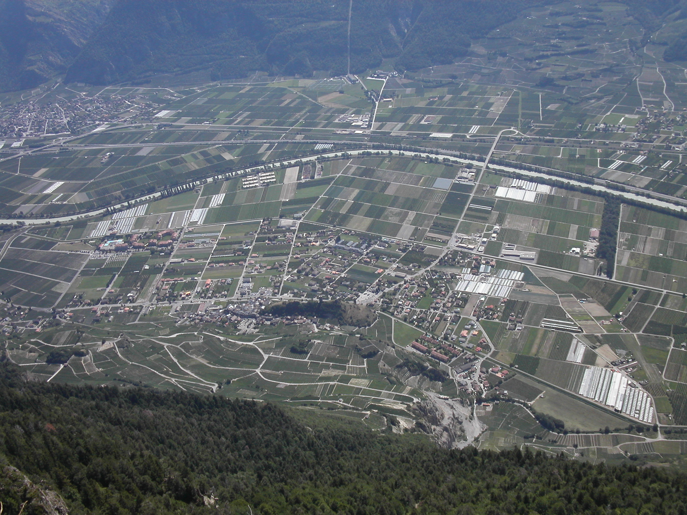 Vue de Saillon, depuis les hauteurs d'Ovronnaz